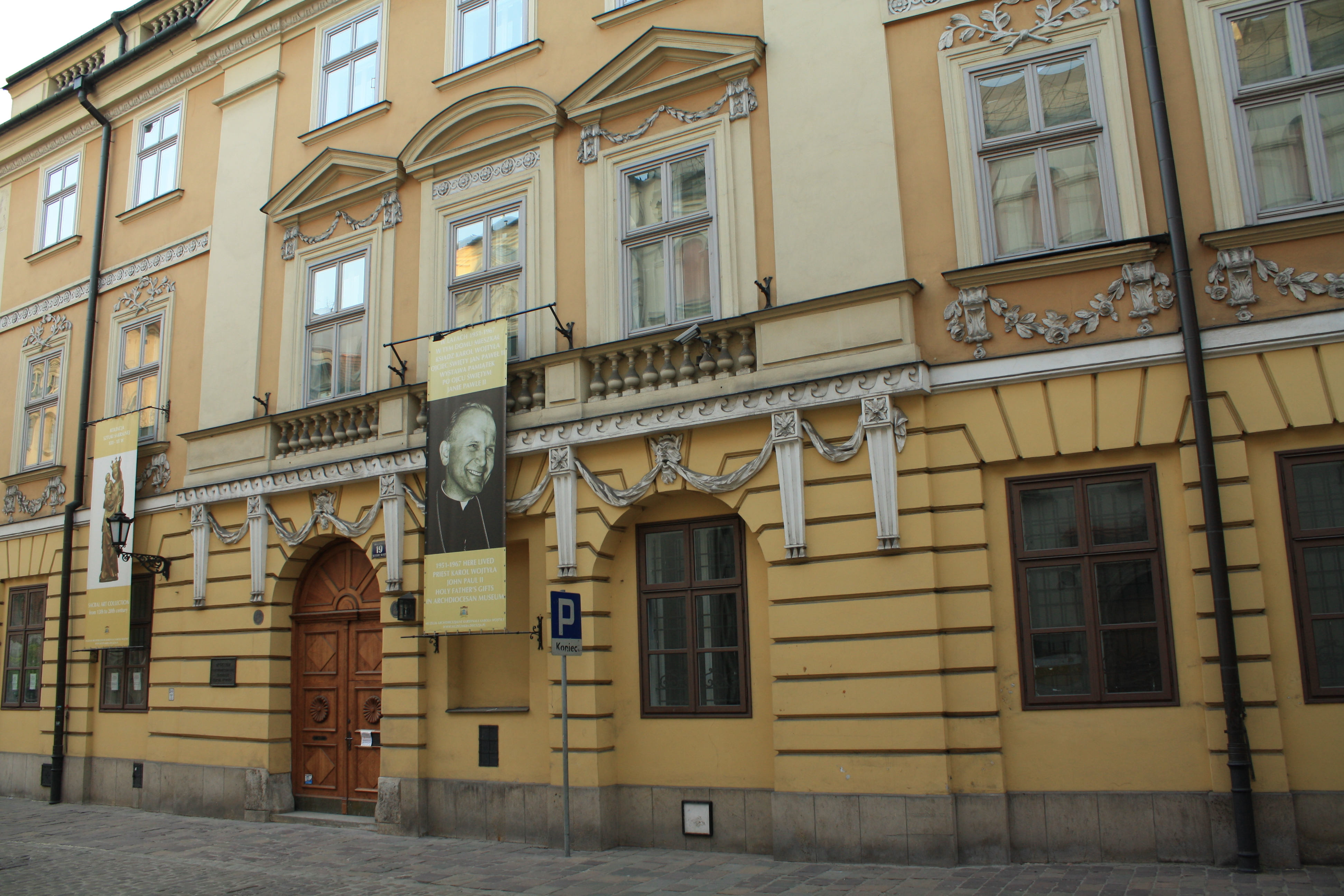 Muzeum Archidiecezjalne w Krakowie, Dom Św. Stanisława, ul. Kanonicza 19